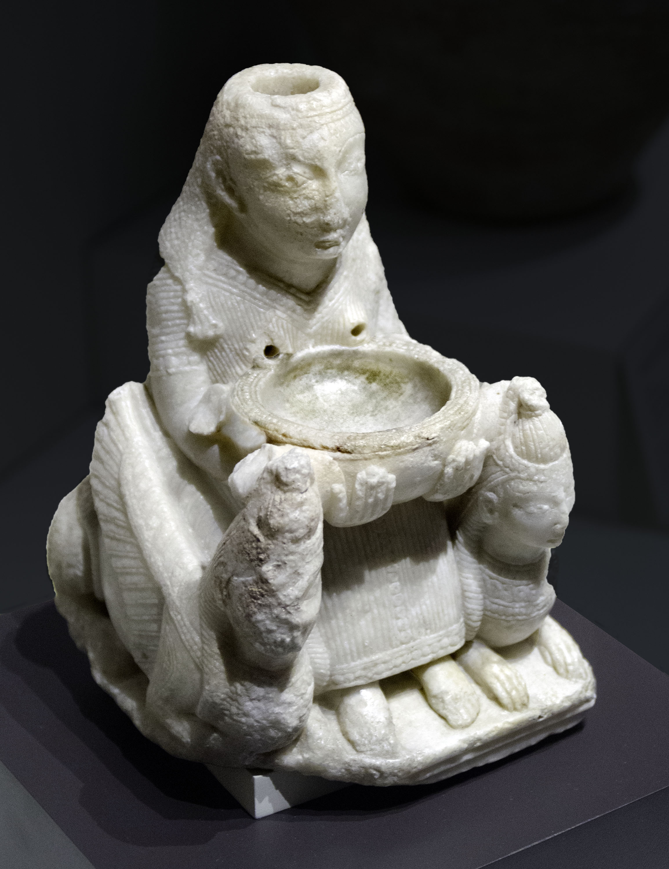 Es una pequeña figura en alabastro encontrada en 1916 una tumba del siglo V a.C. en la necrópolis ibérica de Galera. Se asume que es de origen fenicio y que representa una diosa, posiblemente Astarté o Anat.